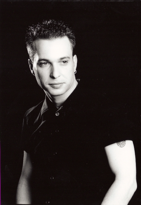 מקס גת-מור. צילום: אילן בשור